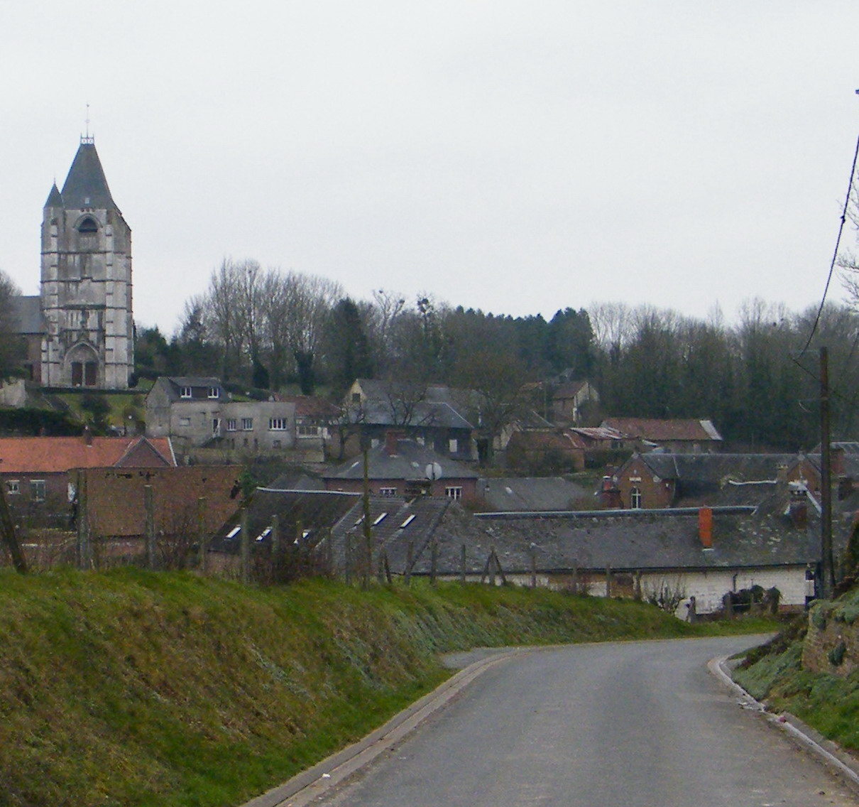 l'église domine le village, pratiquement sur le plateau.